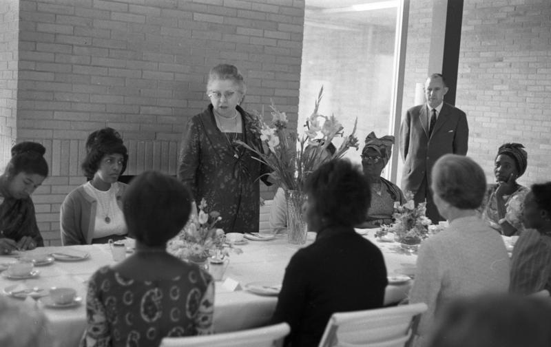 Frau Erhard empfängt afrikanisches Frauen-Seminar